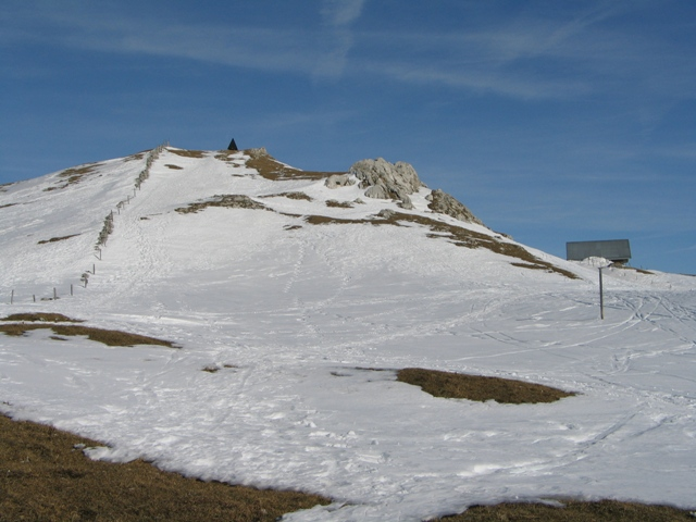 Le Mont Tendre, Jura vaudois, Suisse.